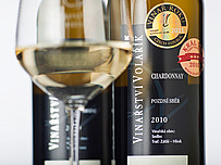 Přívlastková vína z Vinařství Volařík, oceněná cenami Vinař roku 2011 a Král vín 2011.